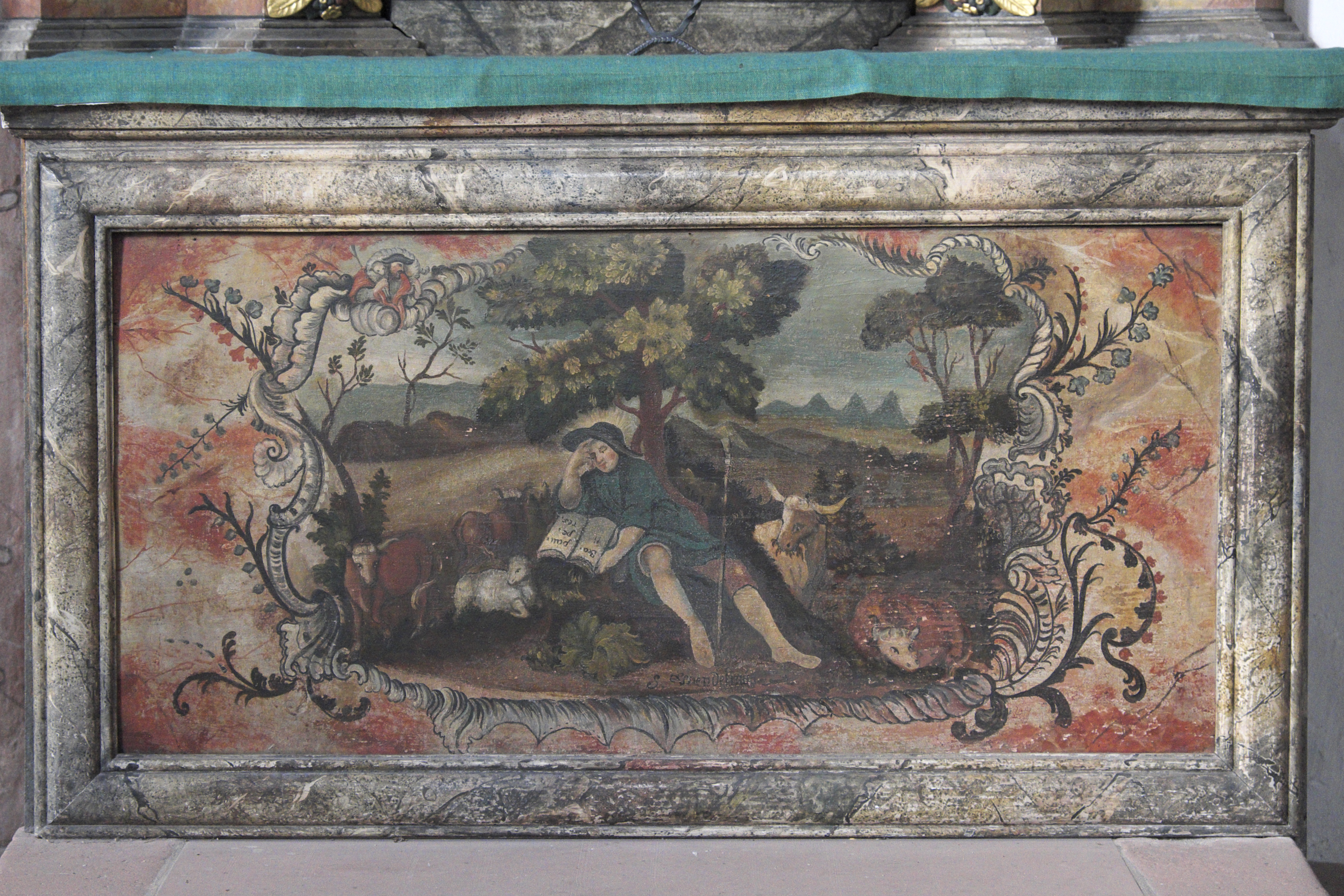 Katholische Martinskapelle in Bürgstadt im Landkreis Miltenberg (Unterfranken/Bayern), Antependium des Wendelinaltars, Gemälde von Nikolaus Hooff, von 1748